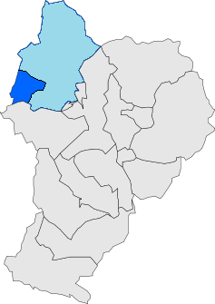 La Mancomunitat dels Quatre Pobles (Alt Àneu, Pallars Sobirà) era un territori comunal d'aprofitament dels recursos dels pobles de València d'Àneu, Esterri d'Àneu, Son i Sorpe